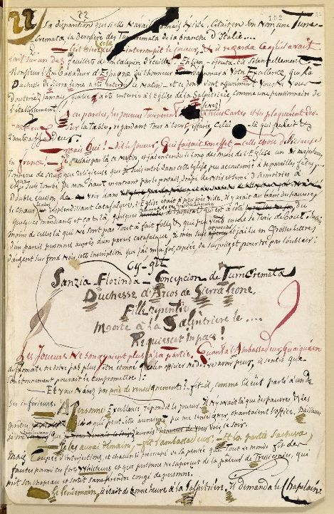 Page manuscrit de la nouvelle des Diaboliques : La vengeance d'une femme folio 102 de Jules Barbey d'Aurevilly (1808-1889)